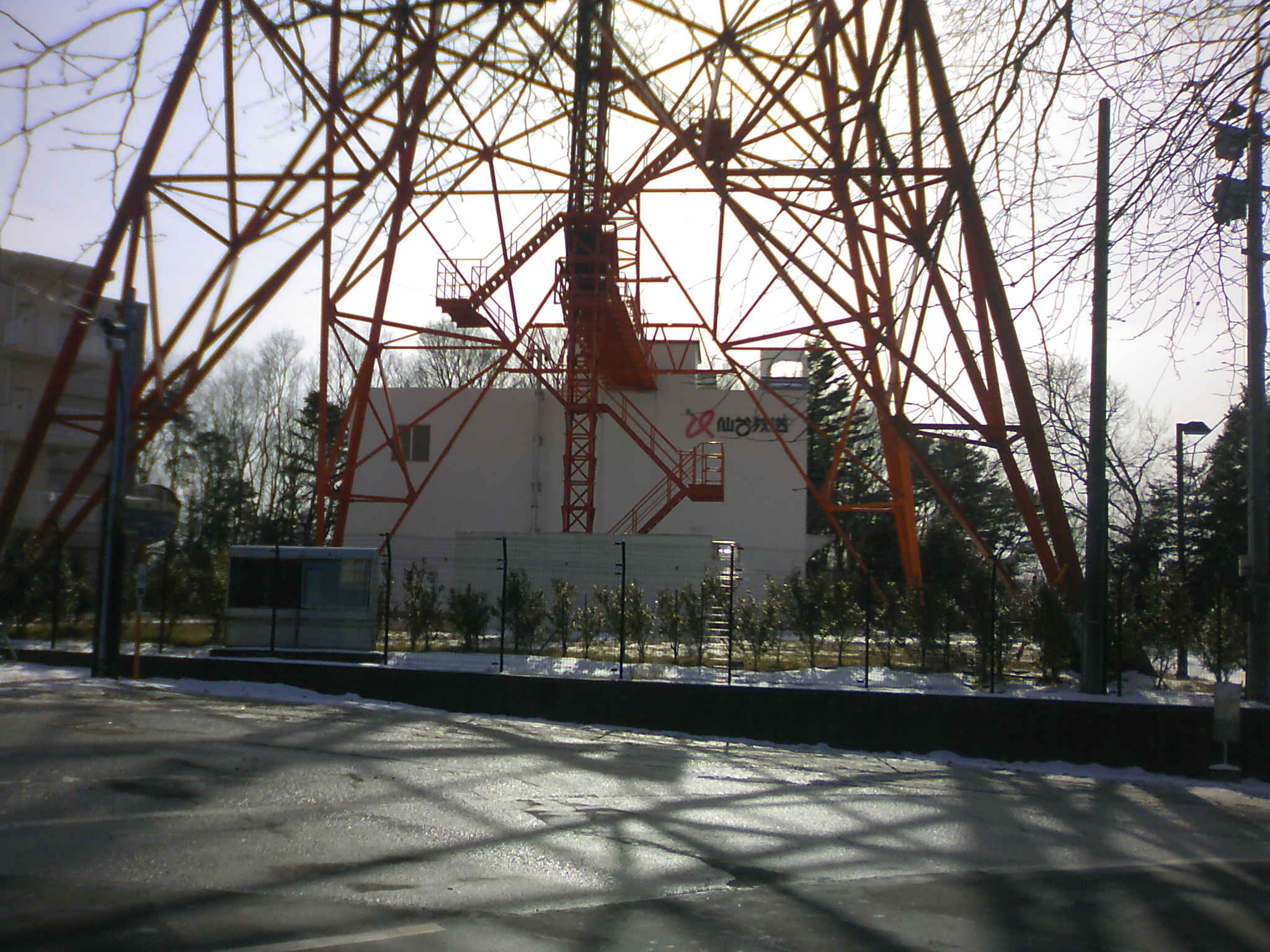 仙台放送茂ヶ崎送信所